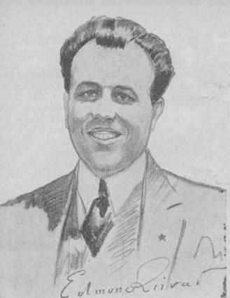 Edmond Privat, desegnaĵo, 1925 (farita dum la UK en Ĝenevo), fotoarkivo de AdUEA, BHH de UEA. Kategorio:Historio de UEA Kategorio:Bildoj de Esperantistoj